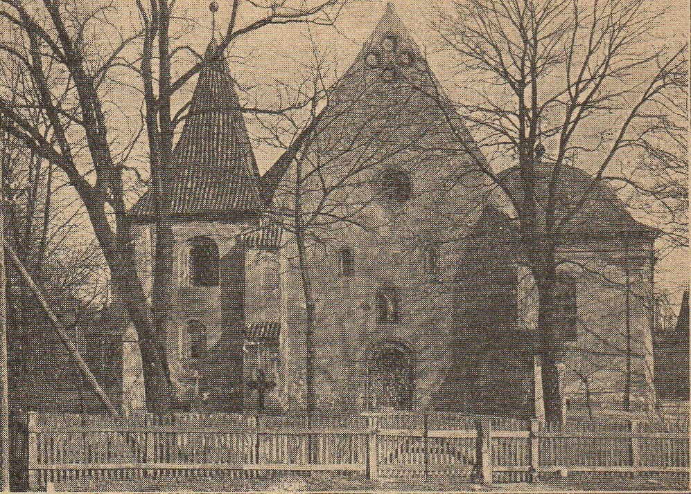 Kościół św. Jana Jeroz. w Poznaniu około 1929.